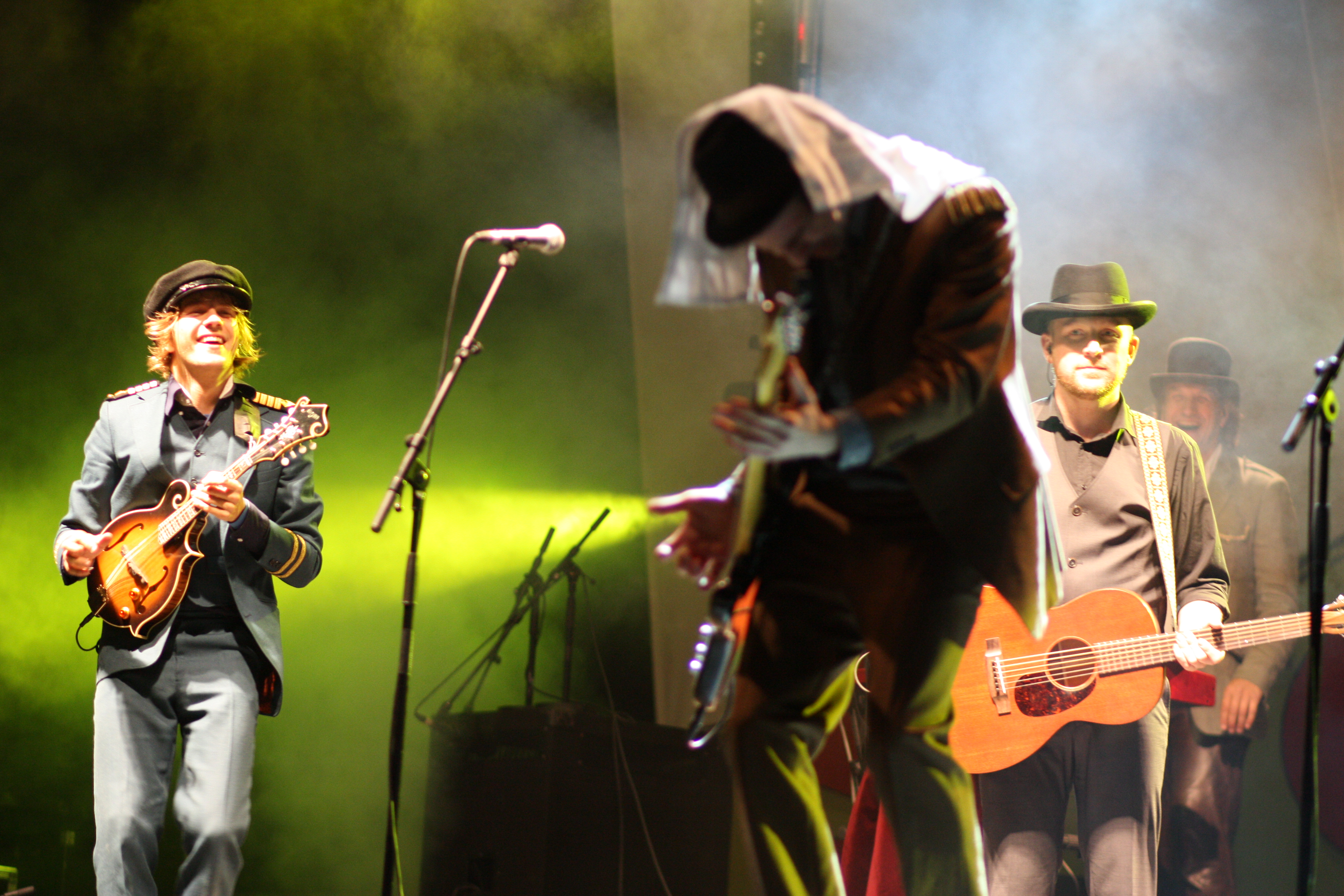 Musikkgruppen Violet Road